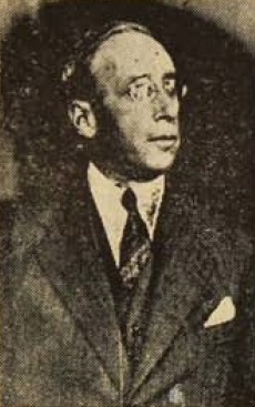 Enrique Costa Pellé (Valparaíso, 19 de junio de 18811​ - 26 de febrero de 19802​ fue un marino chileno.